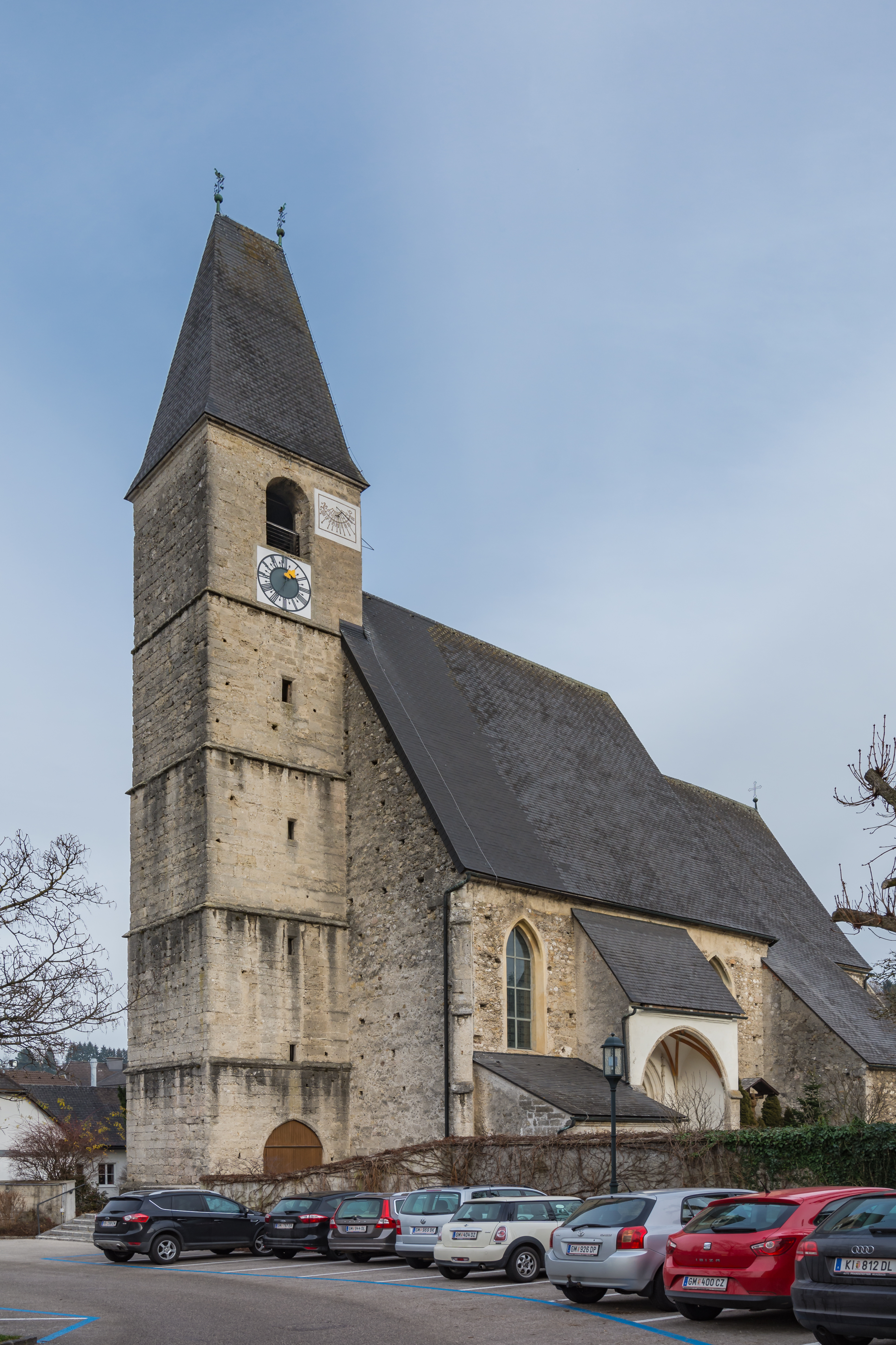 Kath. Pfarrkirche hl. Valentin mit Friedhofsfläche, ehem. Friedhofsportal